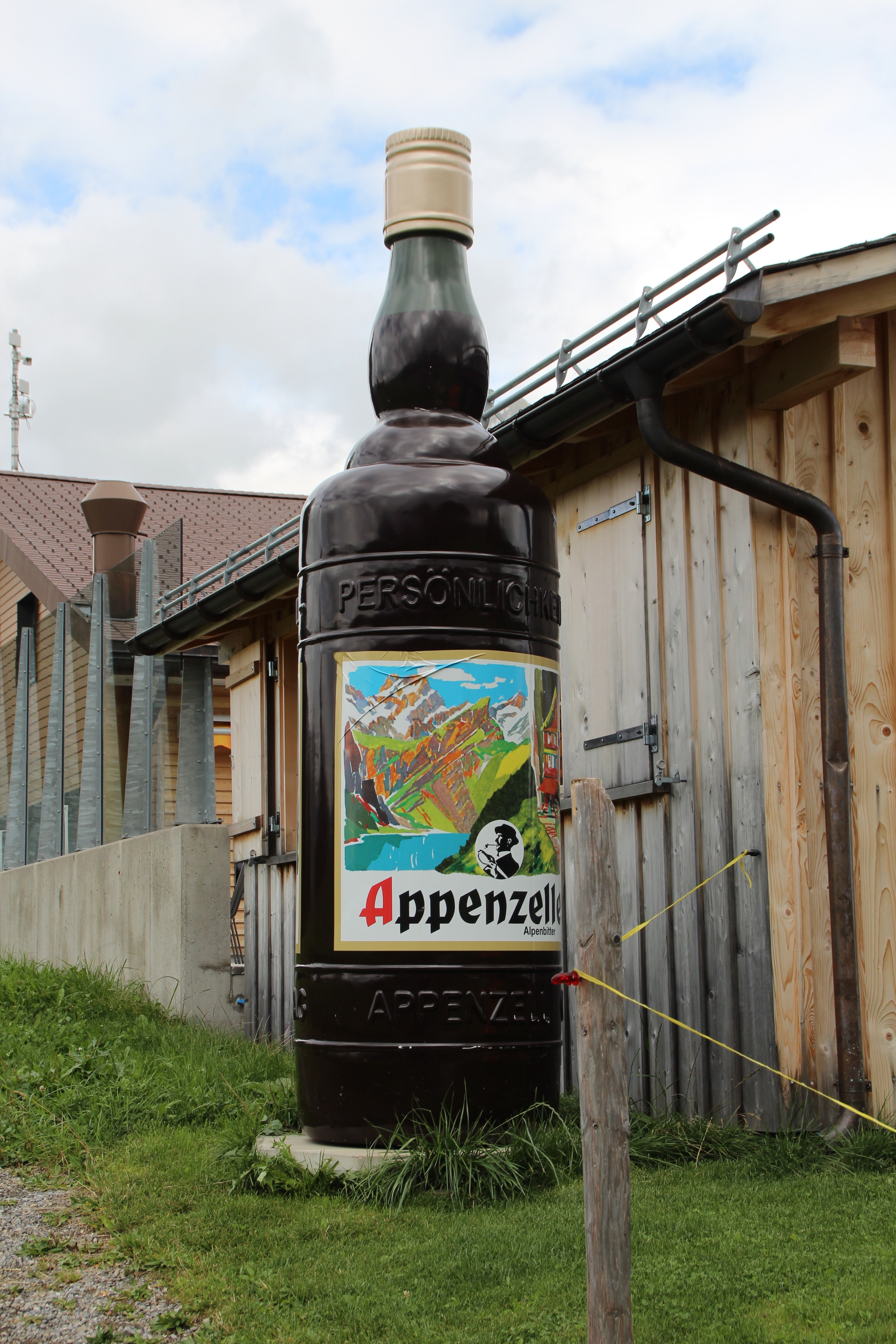 Werbung für Appenzeller Alpenbitter im Oberdorf, Wildhaus SG